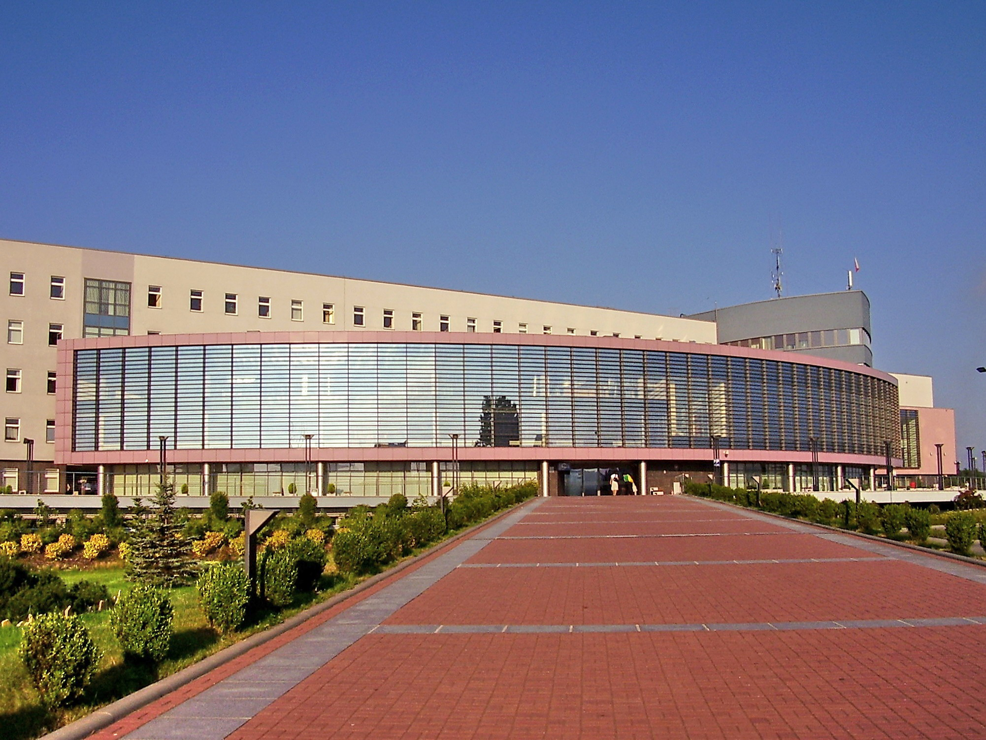 Urząd Miasta,Dąbrowa Górnicza